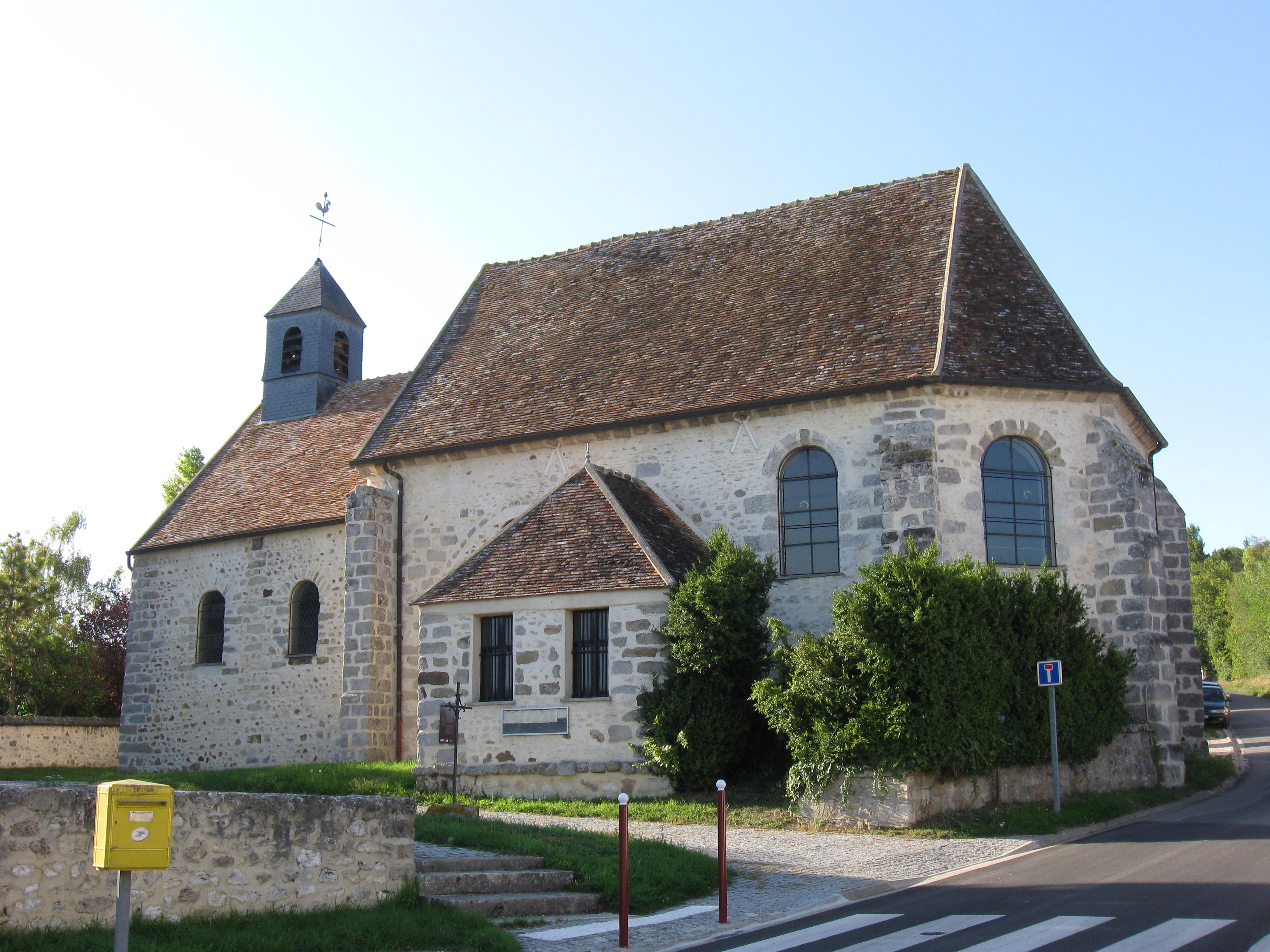 Église Saint-Martin de Courcelles-en-Bassée. (Seine-et-Marne, région Île-de-France).